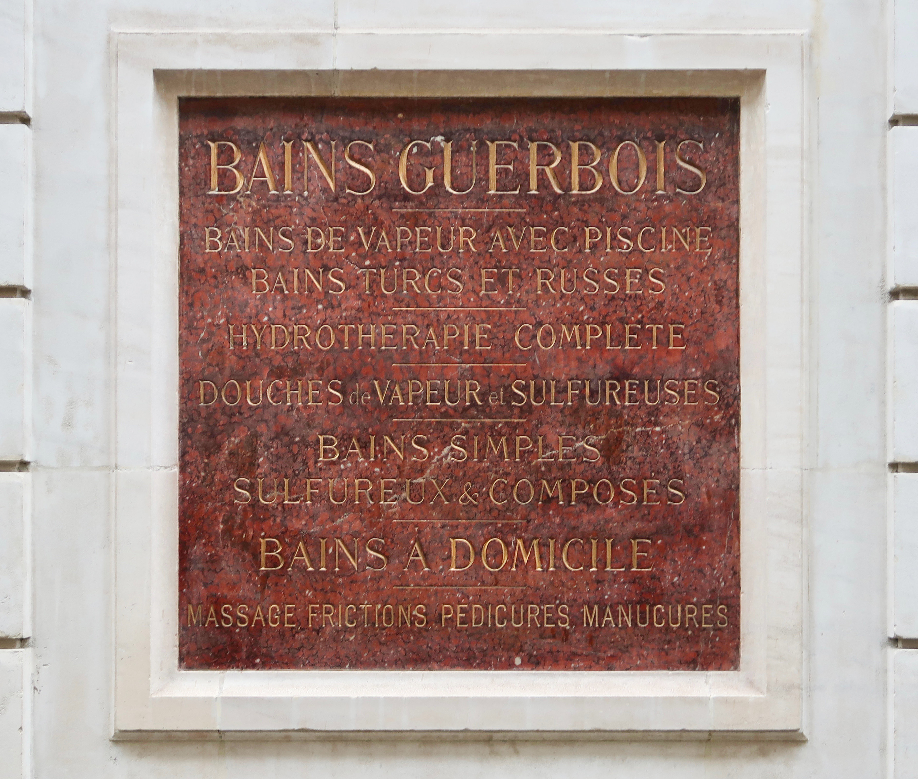 Plaque devant Les Bains Douches, 7 rue du Bourg-l’Abbé (Paris, 3e).